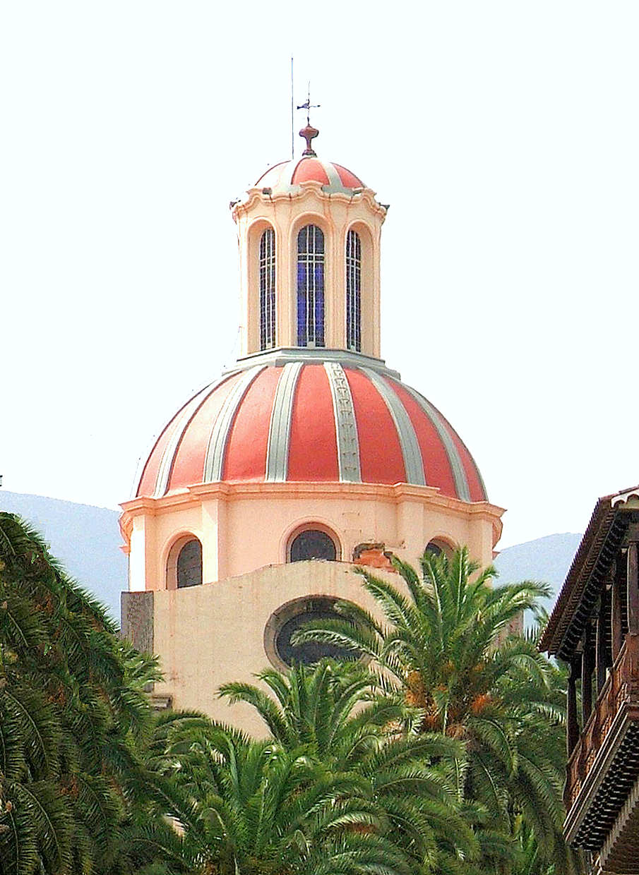 Cupola de la Iglesia Nuestra Señora de la Concepción La Orotava